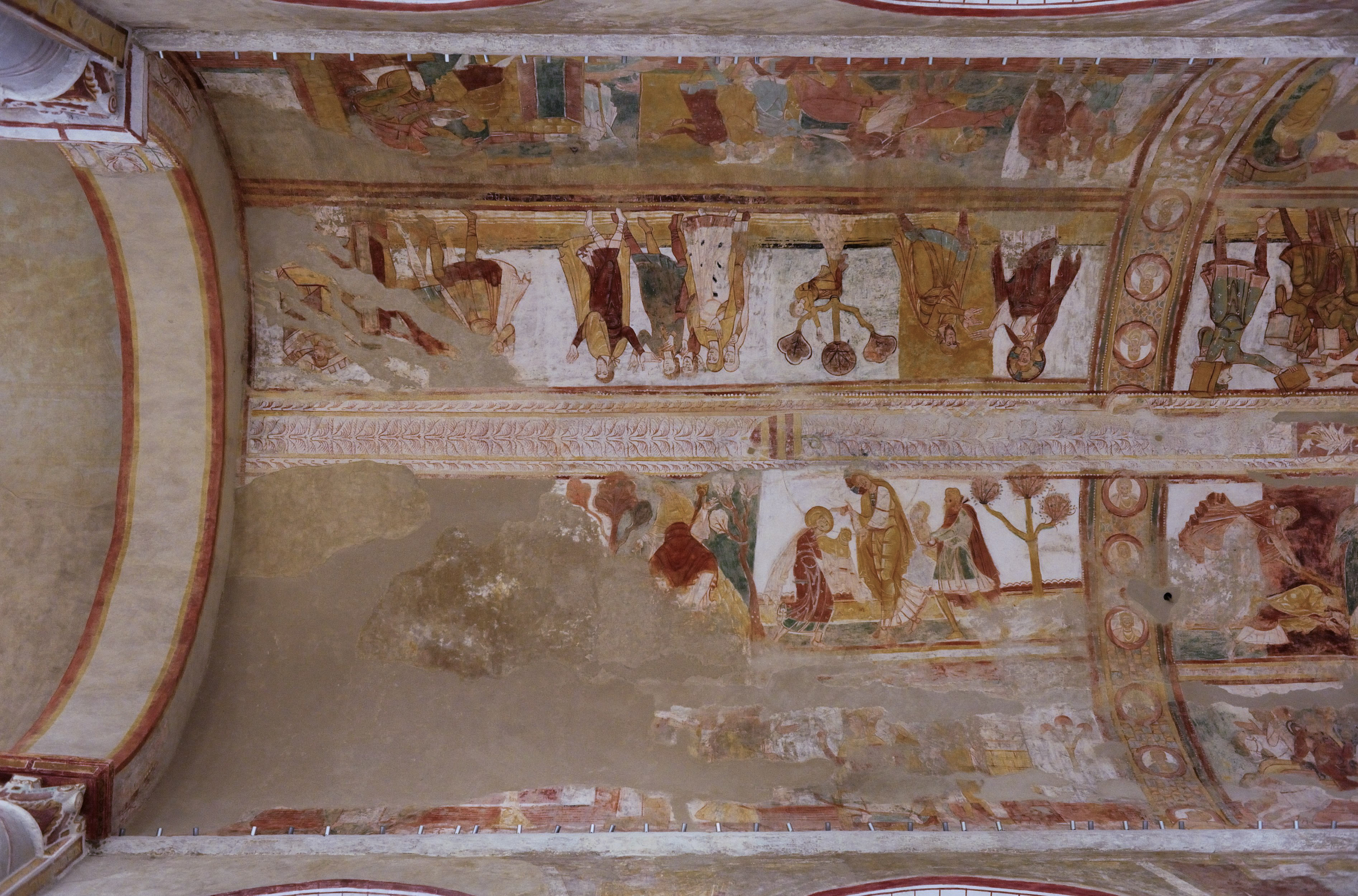 Voir vue compartimentation